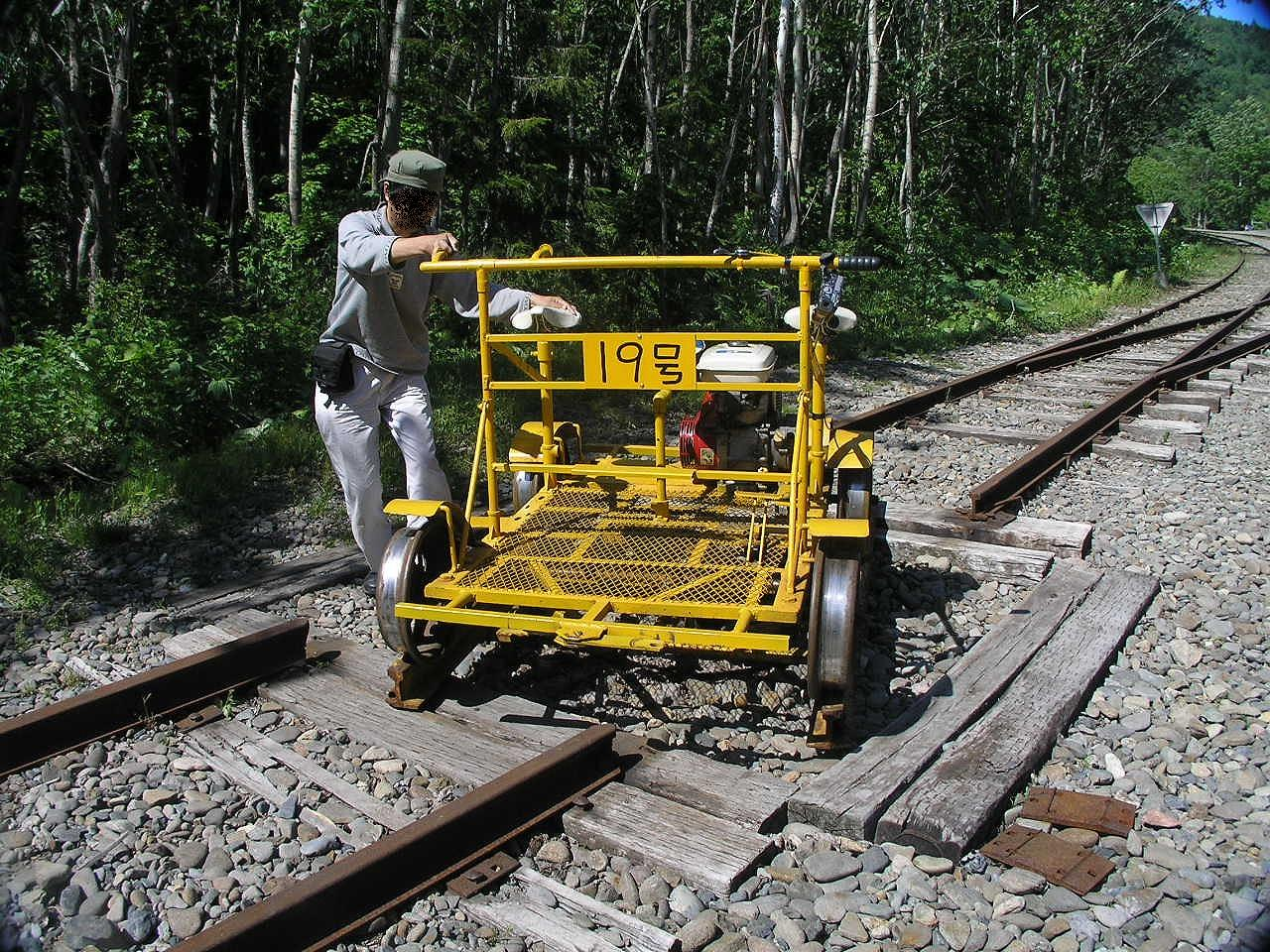 トロッコ王国美深転車台